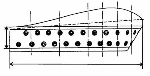 Zeichnung eines Balkongerätes